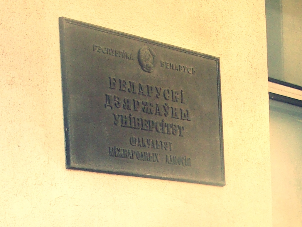 Табличка ФМО БГУ